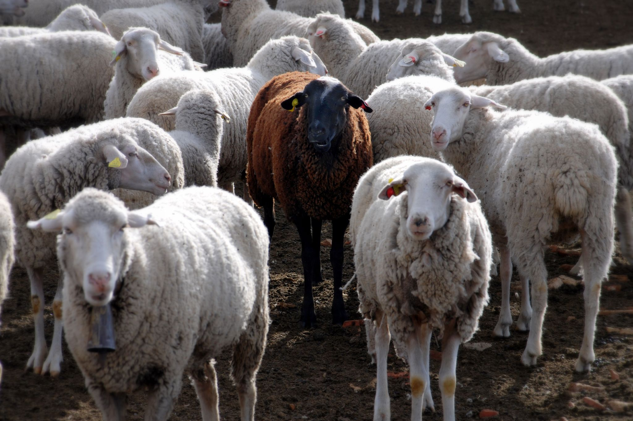 Fotografía tomada en Brunete, Madrid, España.